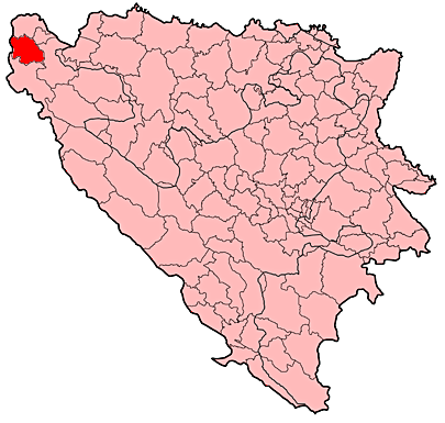 Općina Cazin u Bosni i Hercegovini